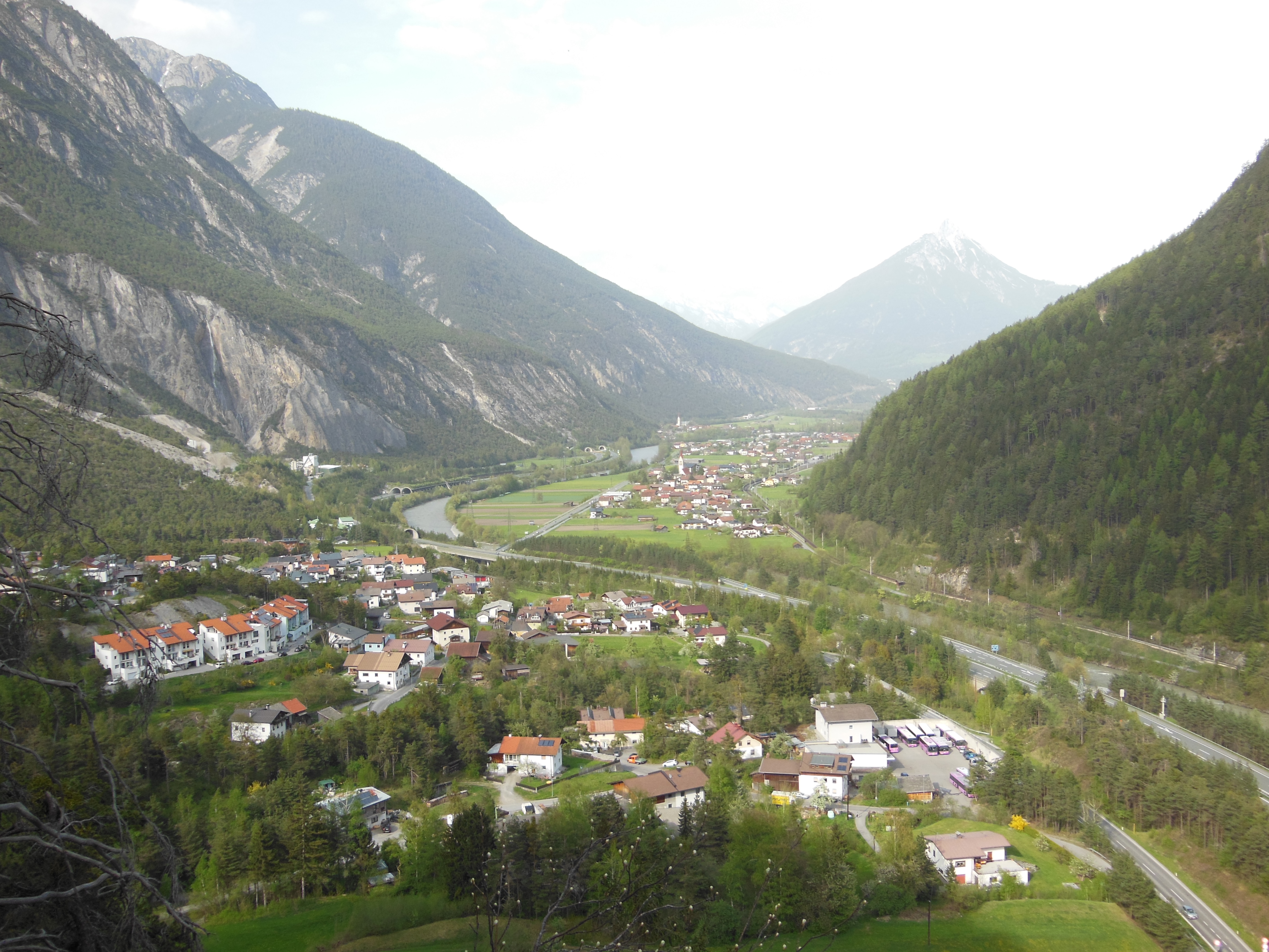 Blick auf Schönwies vom Kopfbühel. Im Vordergrund der Ortsteil Starkenbach. Im Hintergrund der Tschirgant